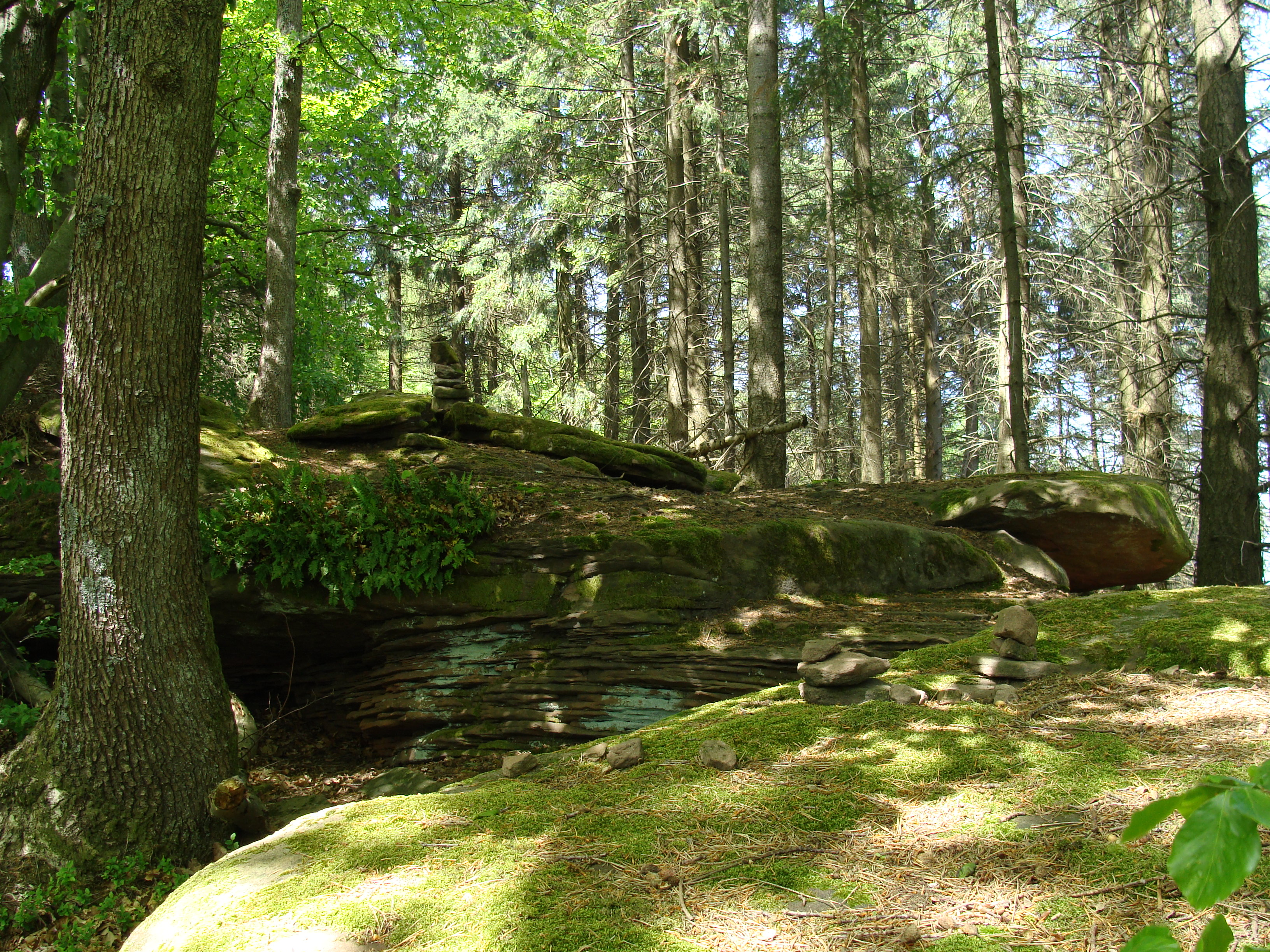 Kesselberg - Gipfelbereich (Pfälzerwald)